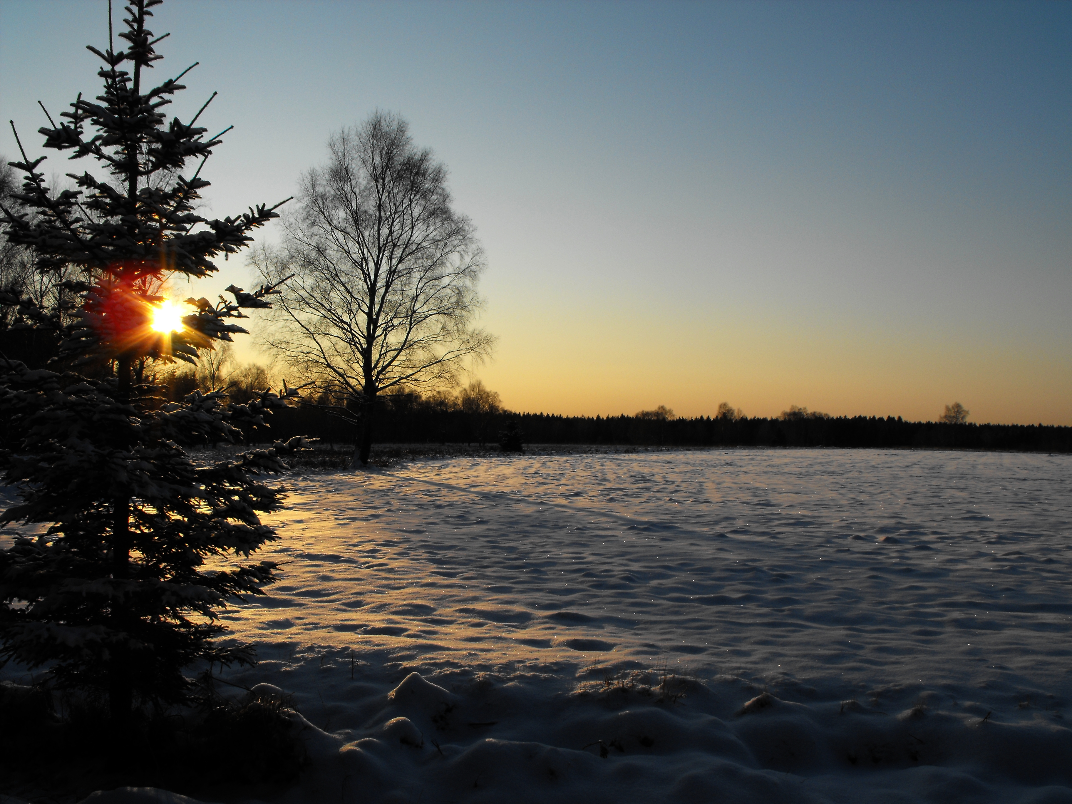 Winter im Hohen Venn